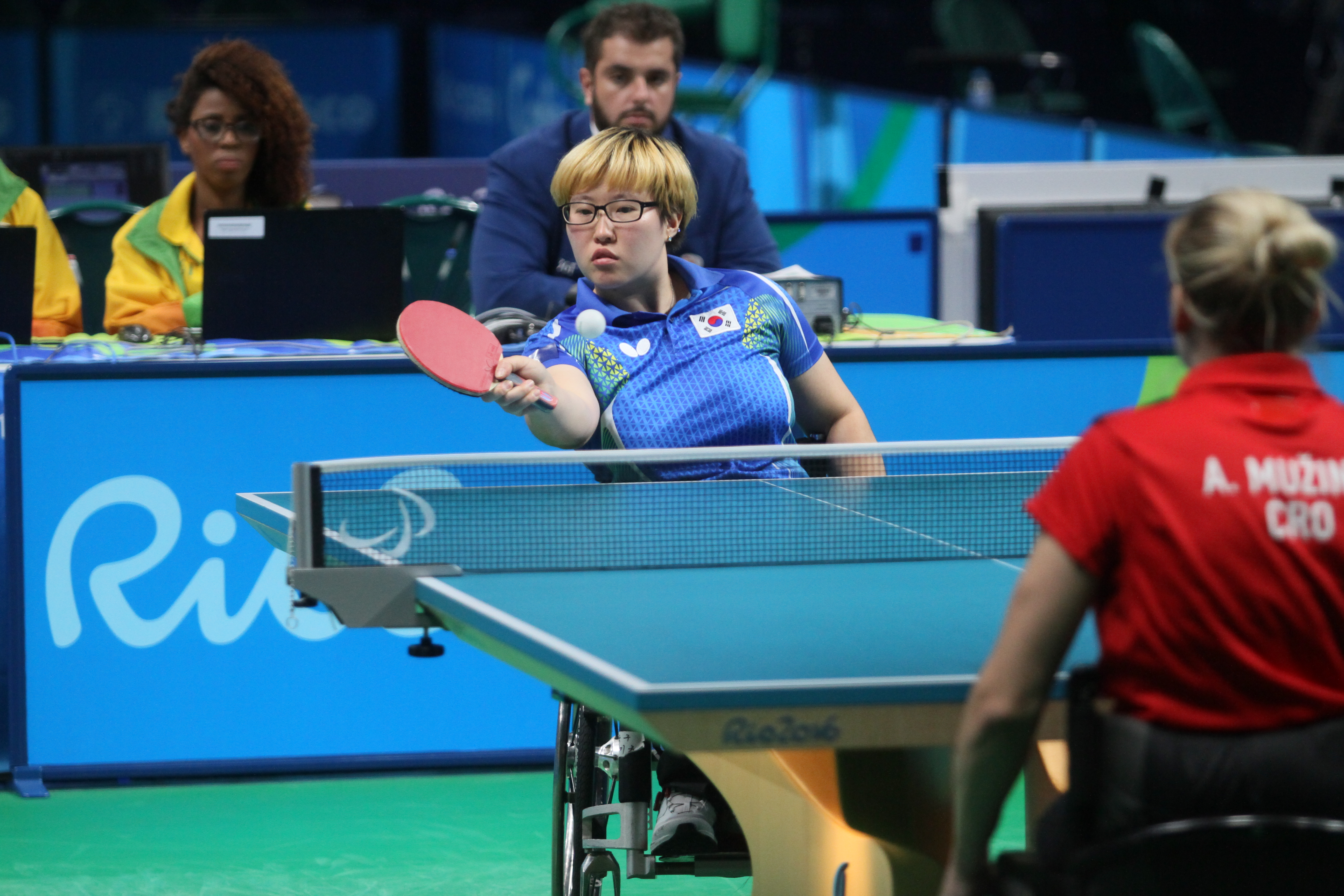 LEE Mi-Gyu (KOR,F3) IMG_5750